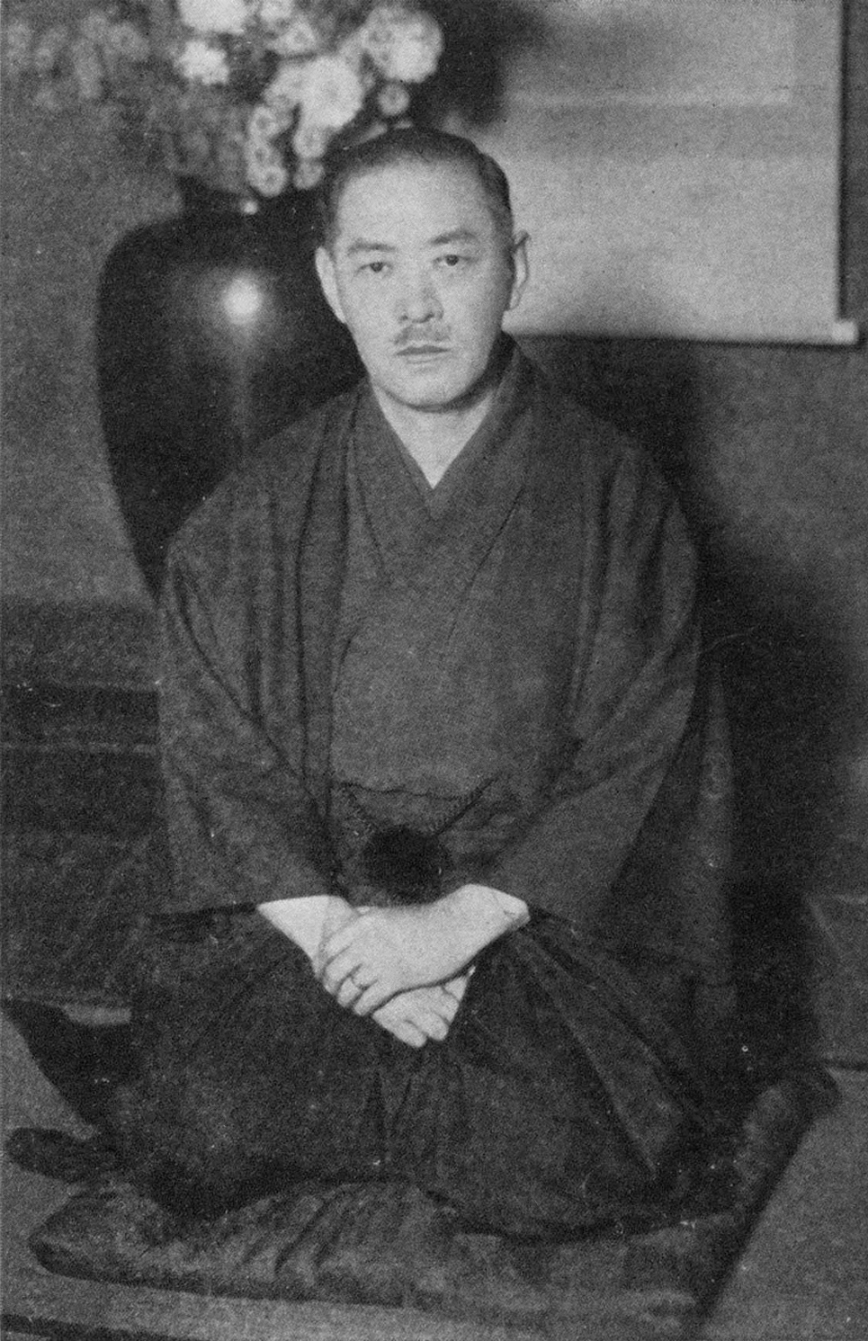 Yoriyasu Arima (有馬頼寧, 1884–1957)